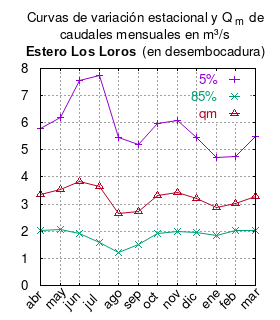 Curvas de variacion estacional para el 5% y el 85% de probabilidad de excedencia con los caudales promedio del estero Los Loros en la desembocadura. # Dirección General de Aguas # Ministerio de Obras Públicas (Chile) # Evaluación de los recursos hídricos superficiales de la cuenca del río Aconcagua. # Santiago de Chile # Ministerio de Obras Públicas (Chile) # enero 2004 # url = # ANEXO 2, CURVAS DE VARIACION ESTACIONAL DE CAUDALES, pág 6, mes 5% 85% qm abr 5.8 2.02 3.36 may 6.21 2.06 3.53 jun 7.54 1.91 3.85 jul 7.73 1.57 3.64 ago 5.47 1.23 2.67 sep 5.21 1.52 2.73 oct 5.99 1.9 3.33 nov 6.09 2 3.44 dic 5.44 1.95 3.19 ene 4.72 1.86 2.89 feb 4.76 2.04 3.03 mar 5.5 2.04 3.28